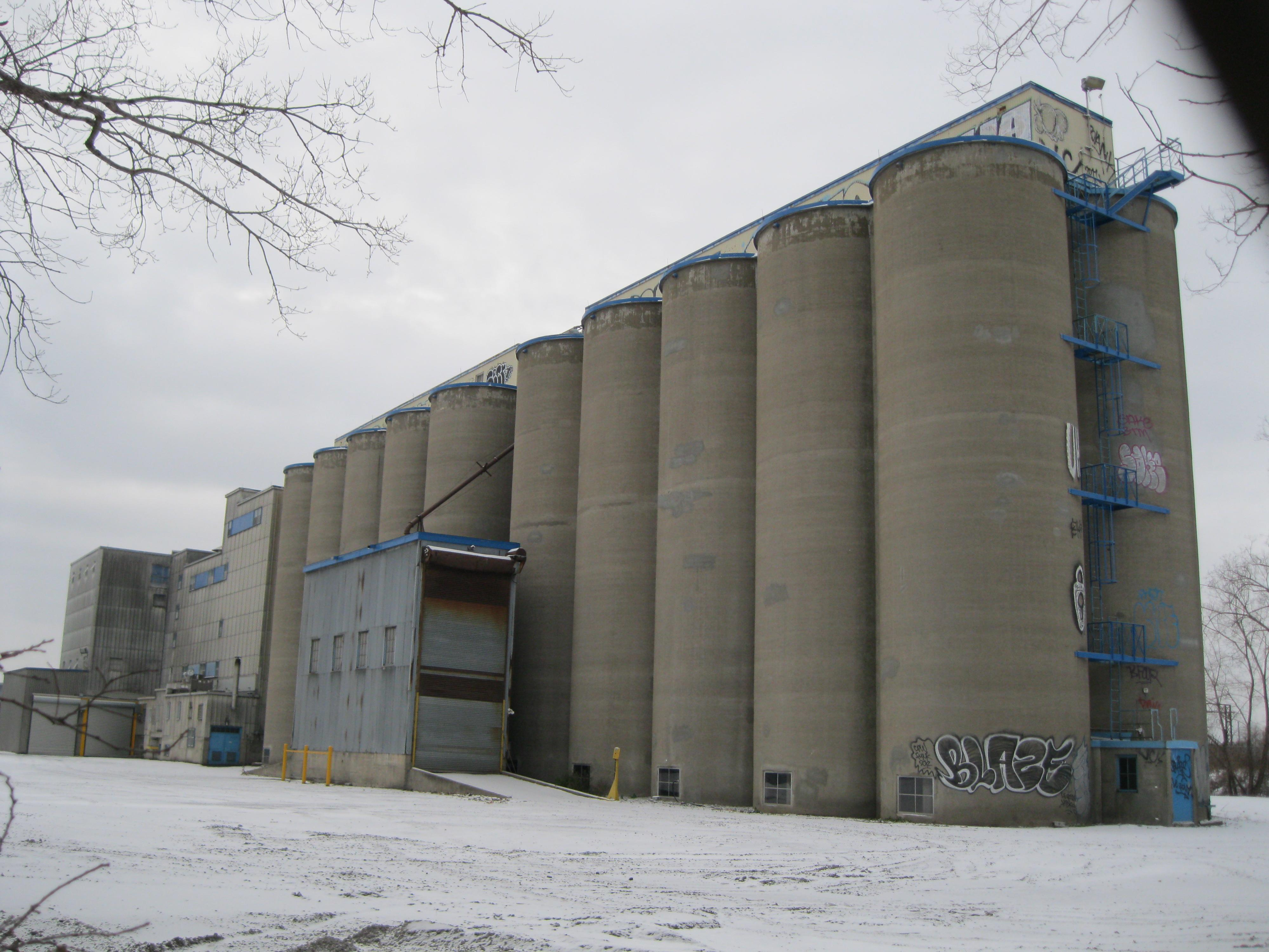 Cereal Foods Canada Inc, 380, rue Oak, Montréal